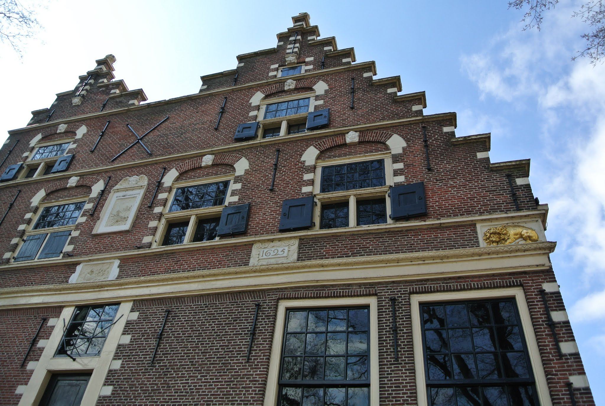 Enkhuizen, Netherlands